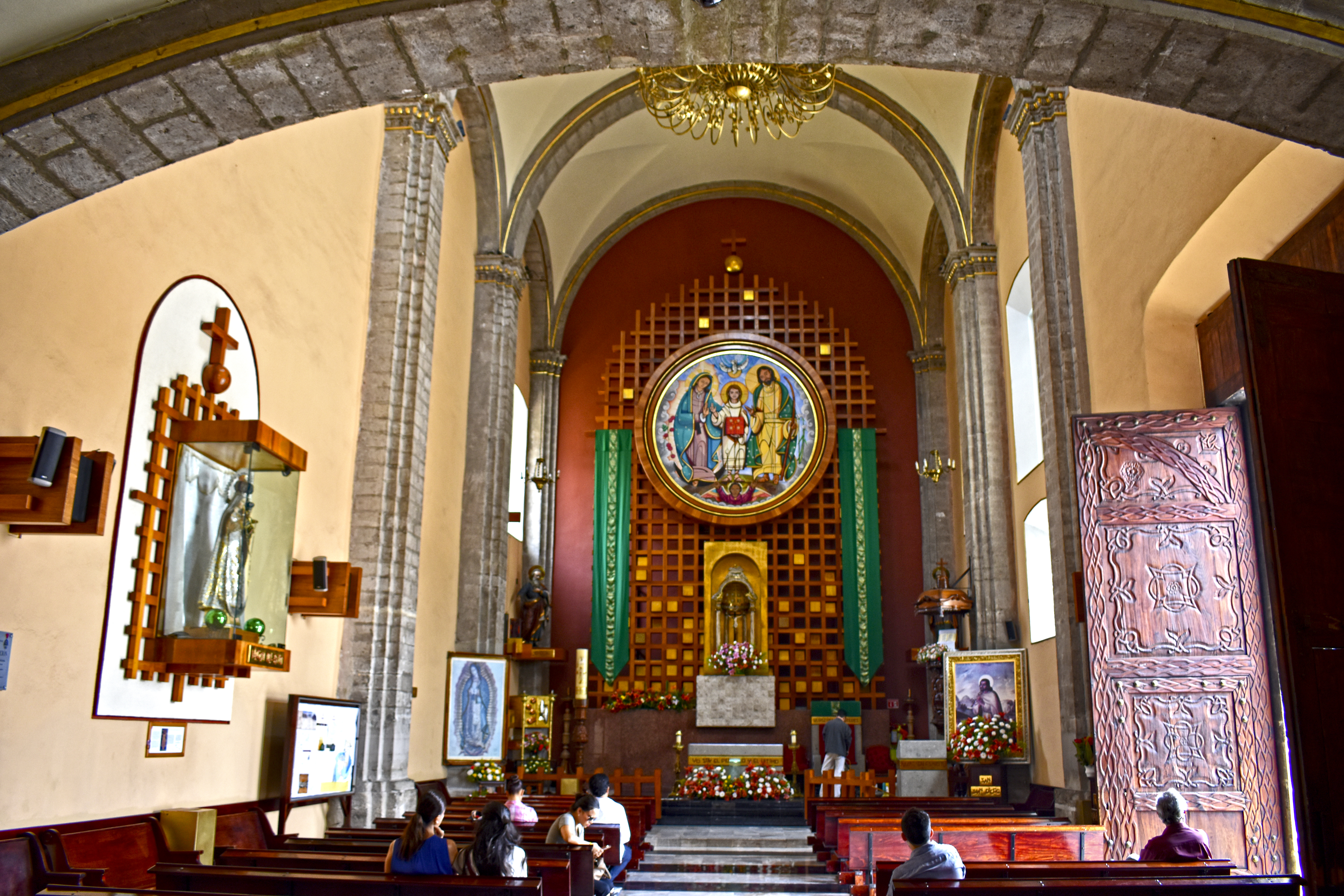 Vista interior de la Parroquia de Santa María de Guadalupe, mejor conocido como Convento de las Capuchinas. Conjunto Villa de Guadalupe